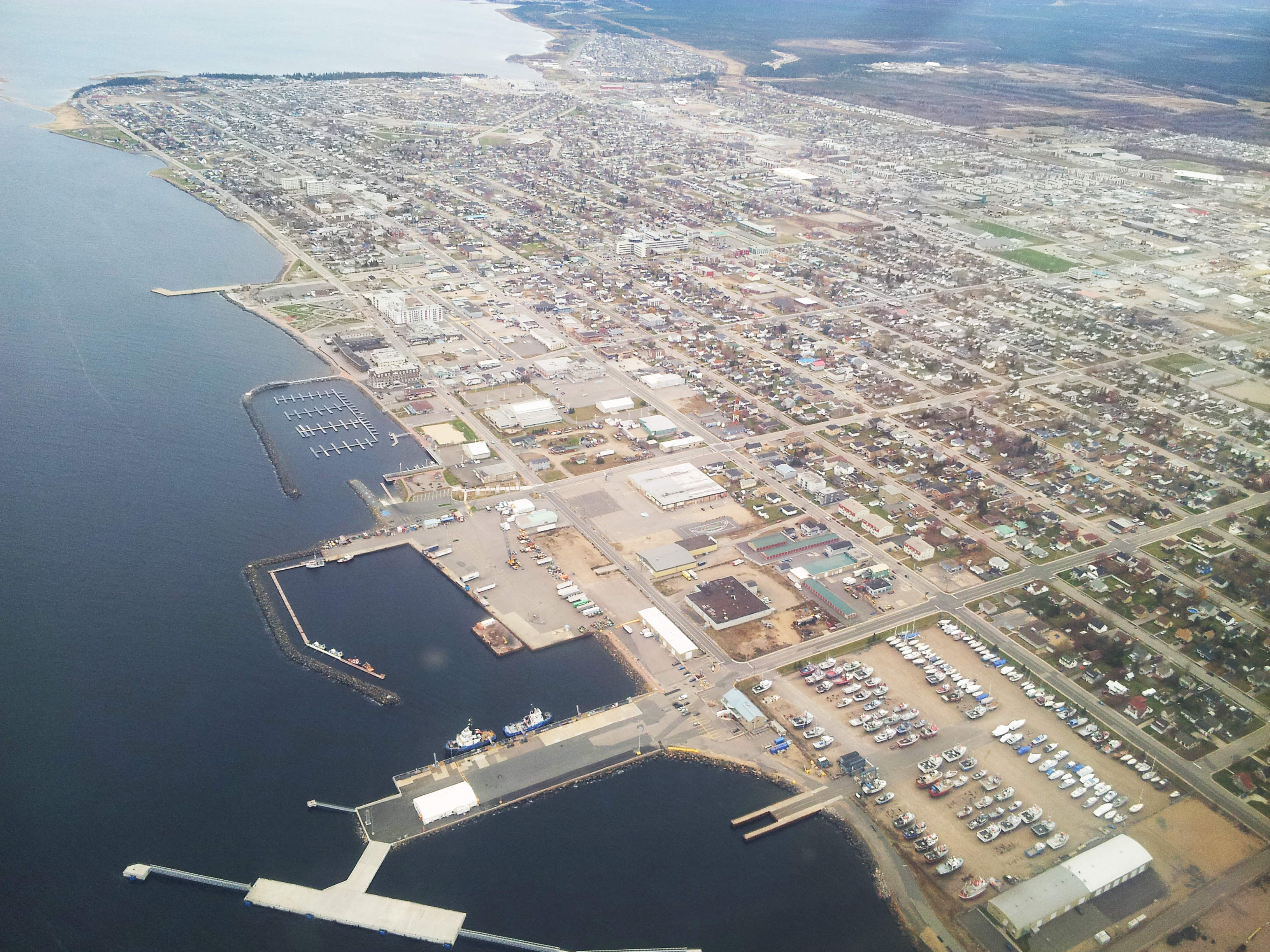 Vue aérienne de Sept-Îles en 2014.